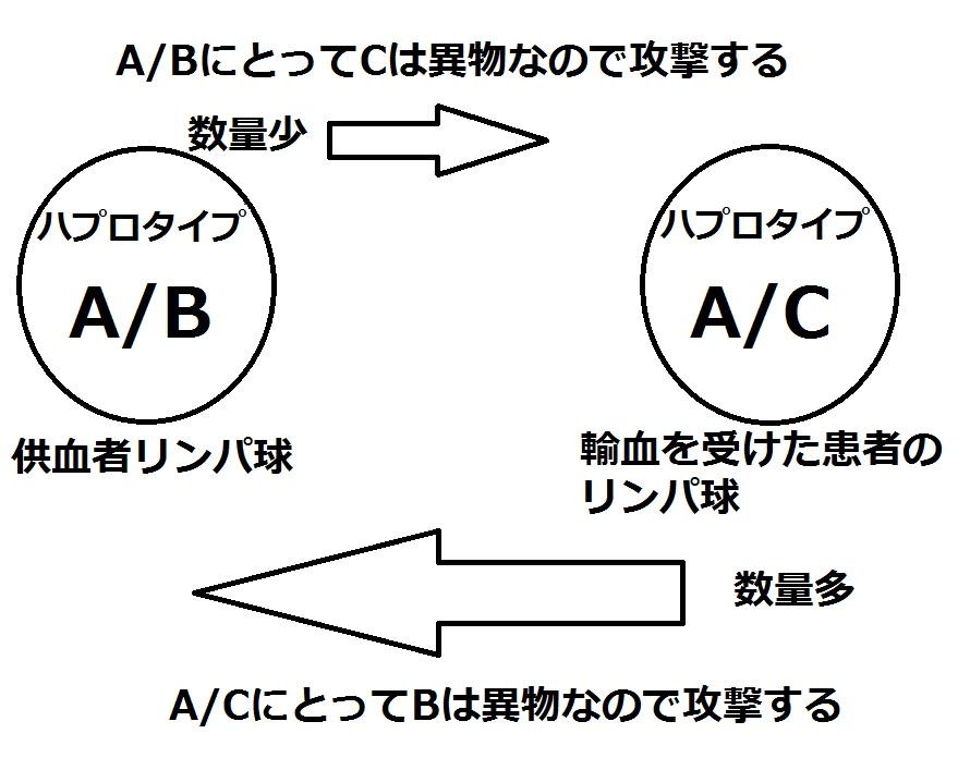 HLA型不一致の場合の供血者リンパ球VS患者リンパ球